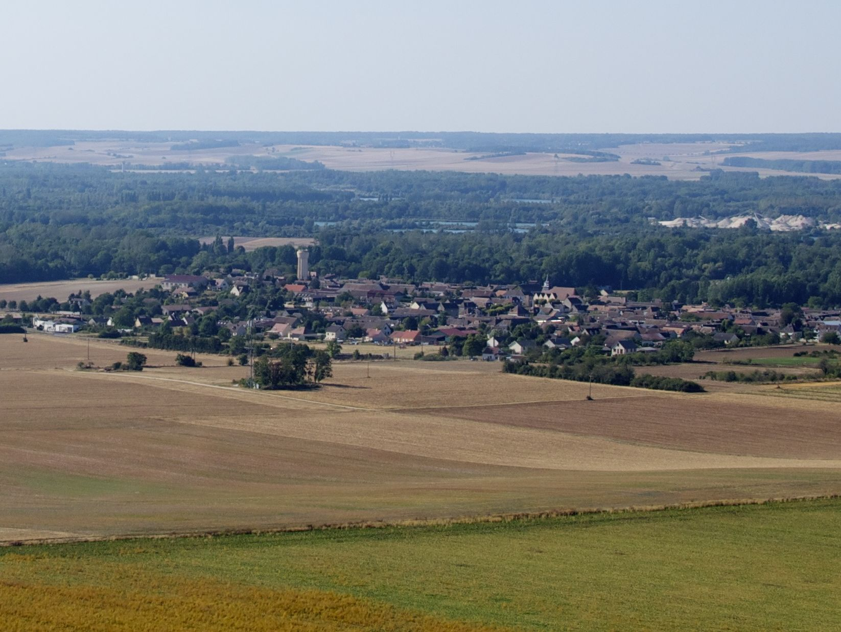 Le village de Bazoches-lès-Bray. (Seine-et-Marne, région Île-de-France).